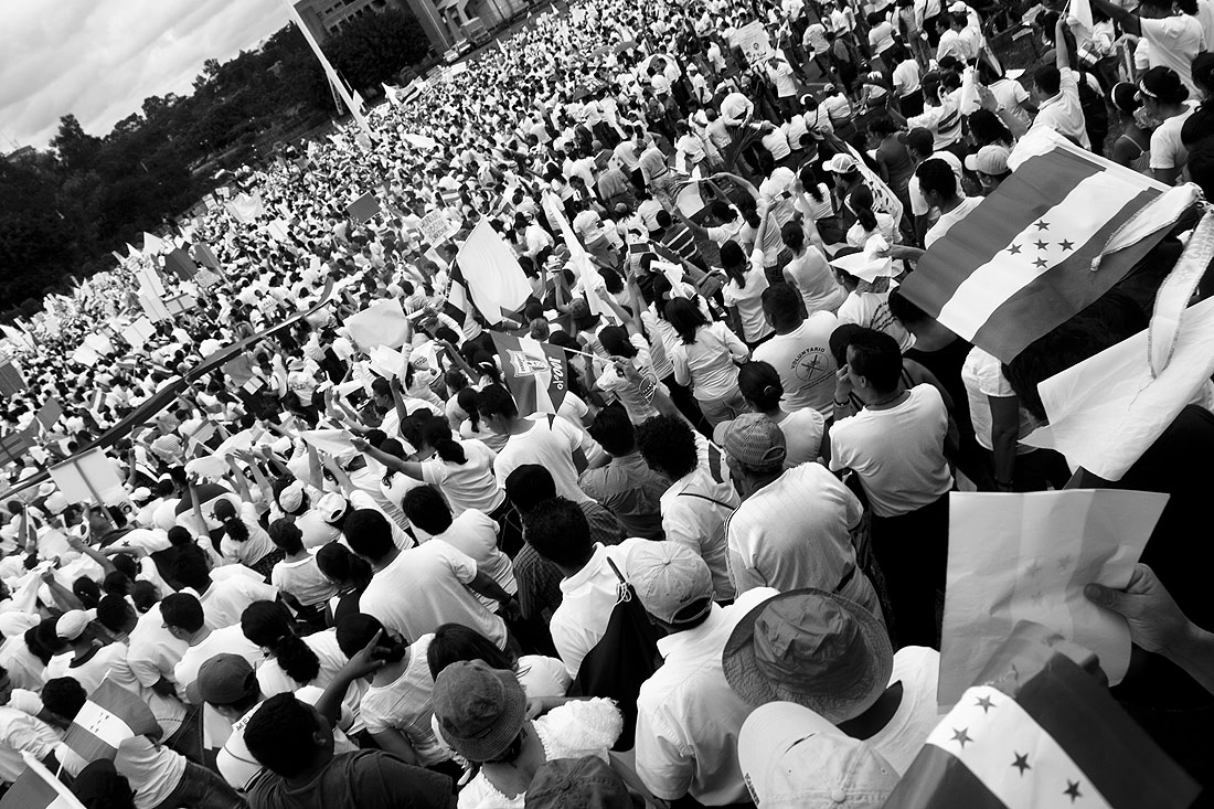 Hondurans opposing Manuel Zelaya.